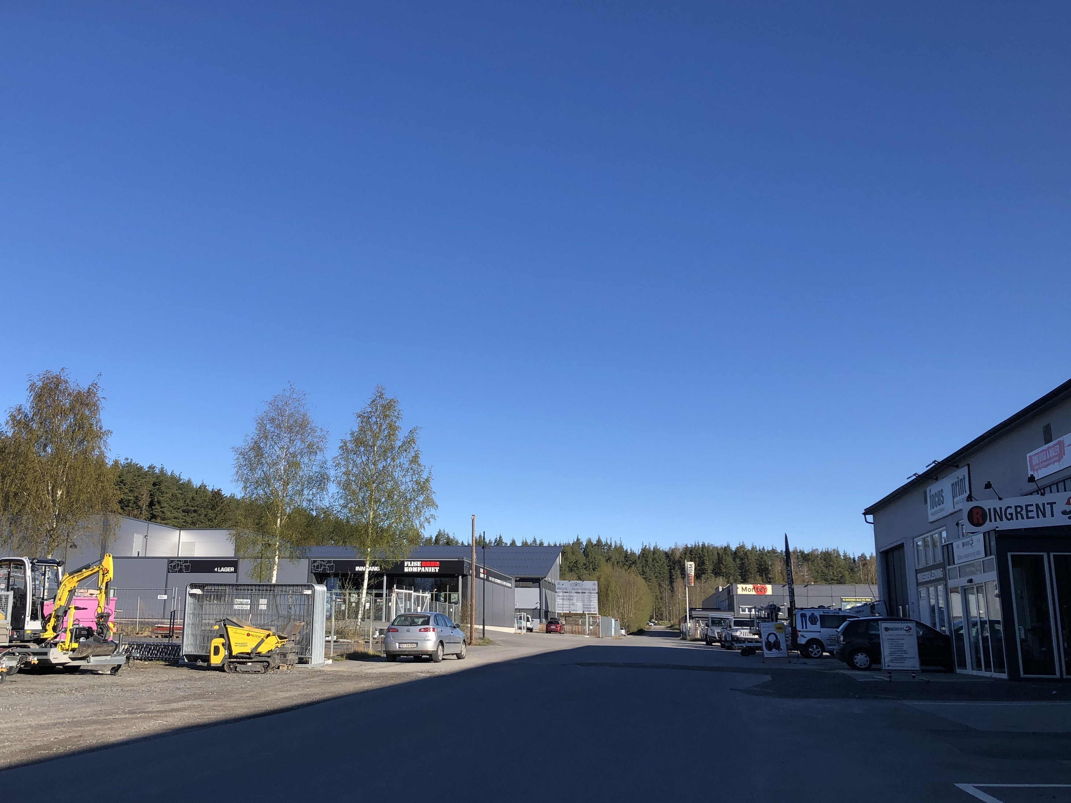 Tyrimyrveien, Ringerike